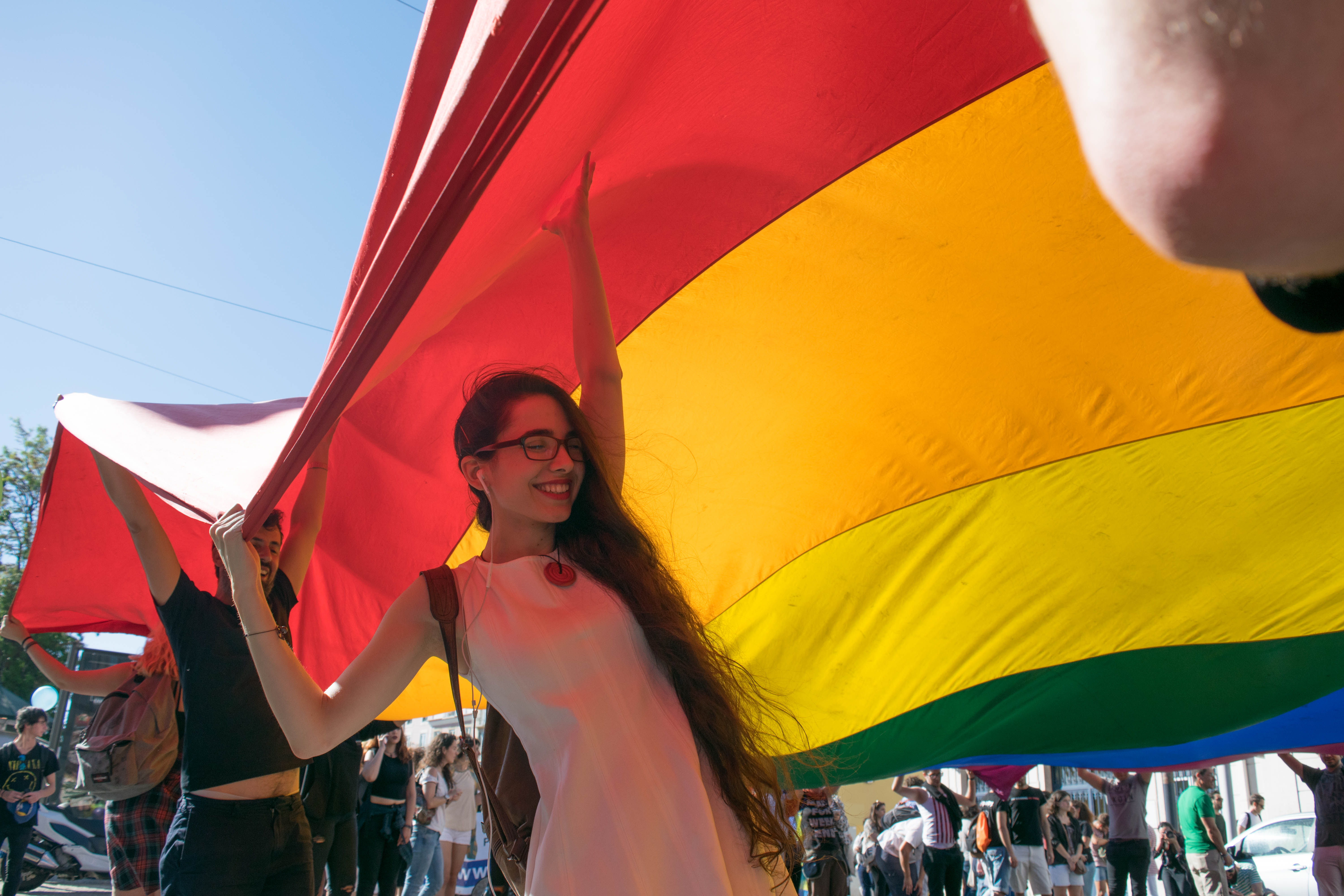 marcha